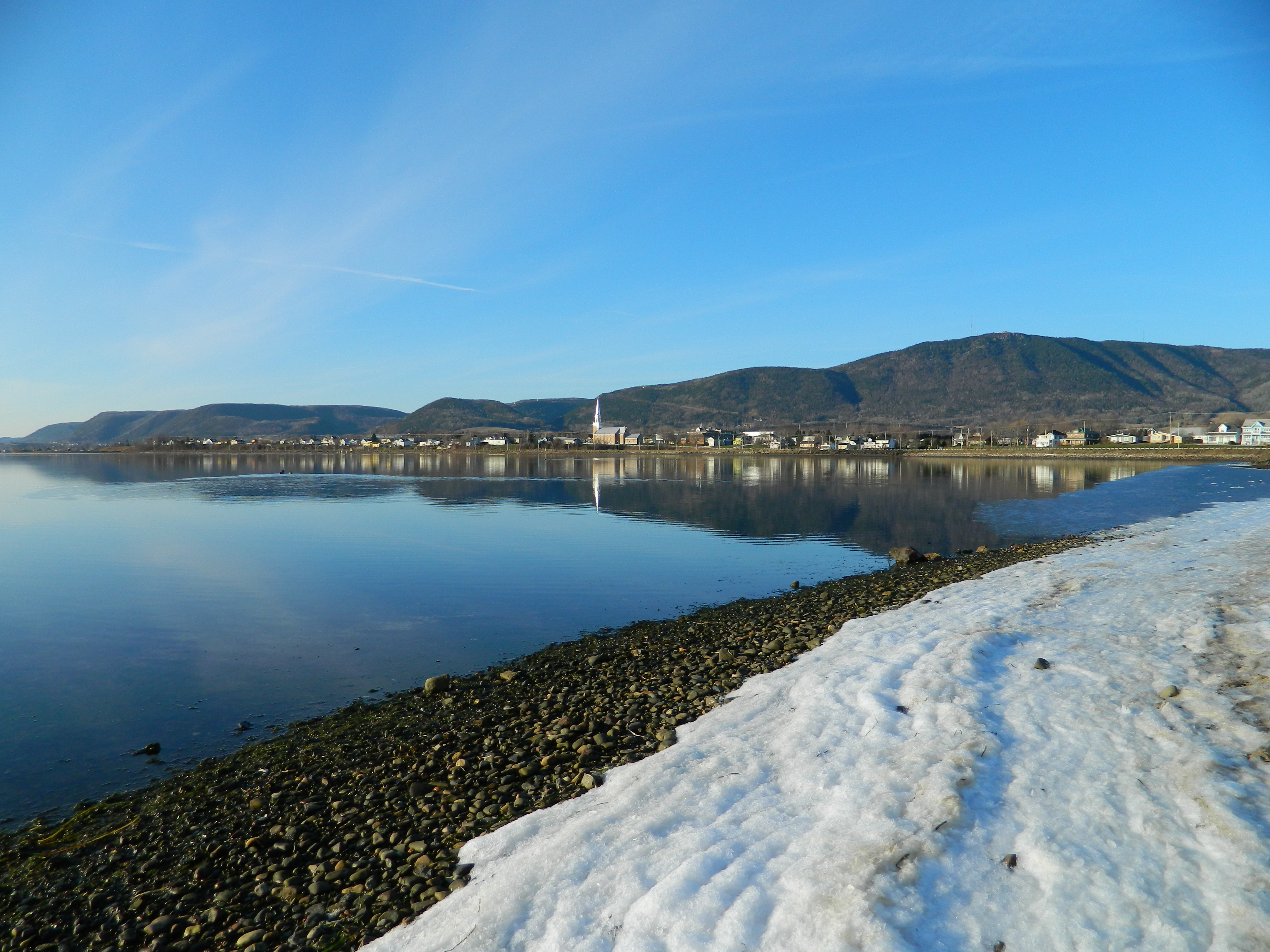 Panorama de Carleton-sur-Mer